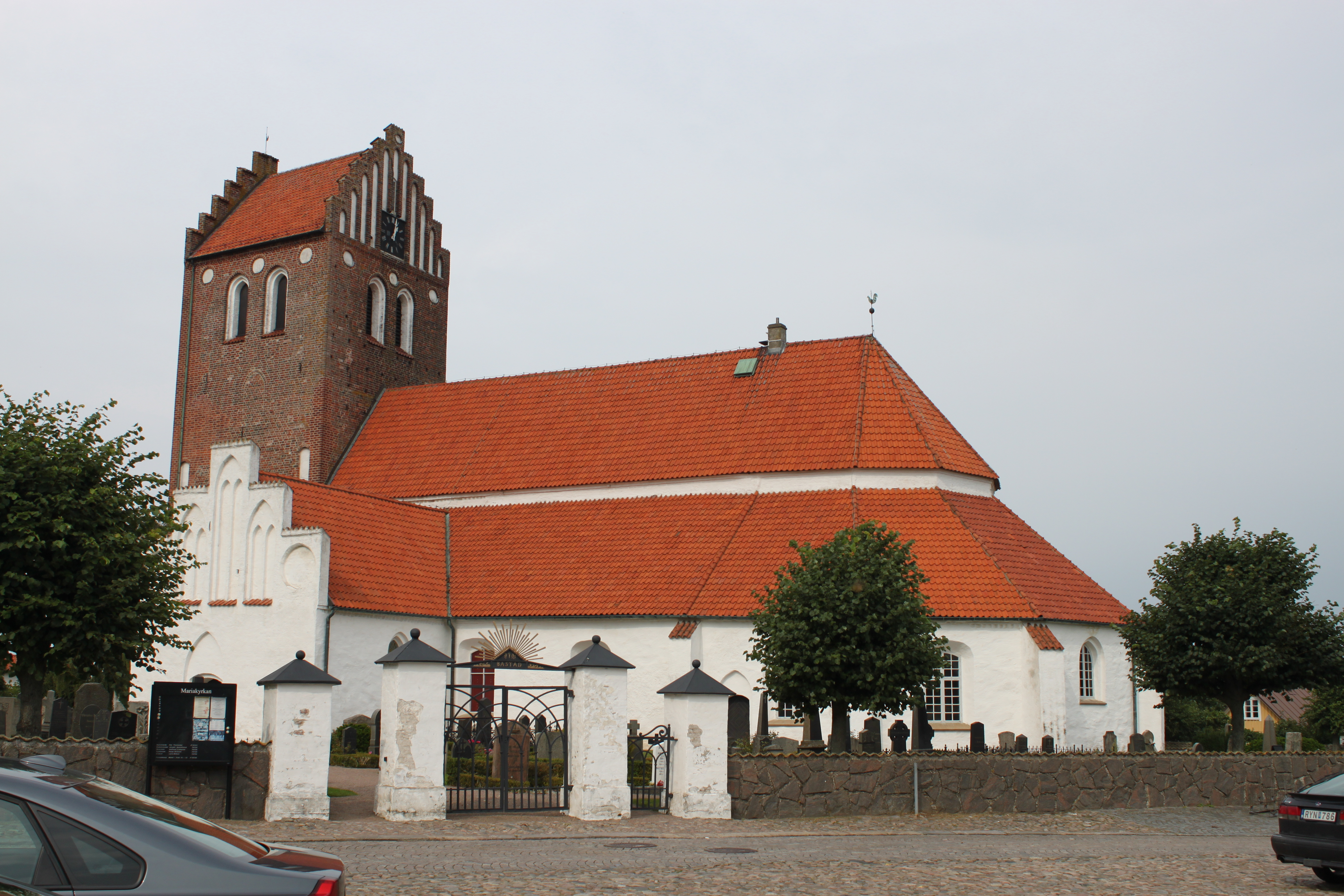 Mariakyrkan Båstad